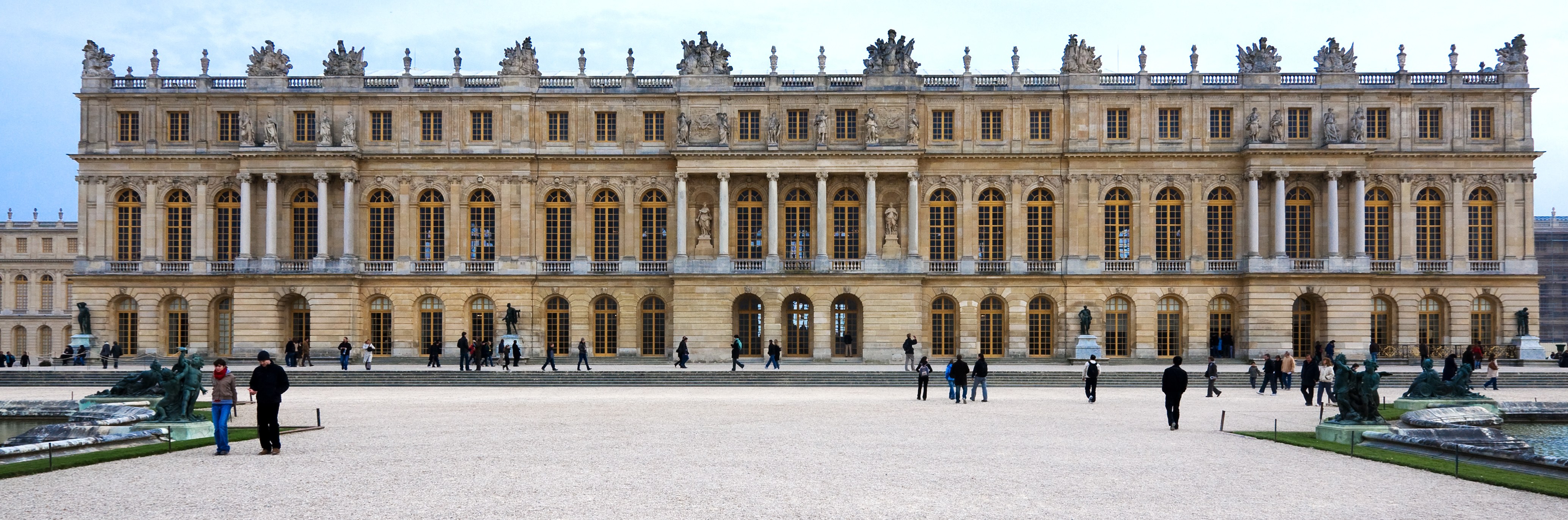 Façade du château de Versailles, vue des jardins